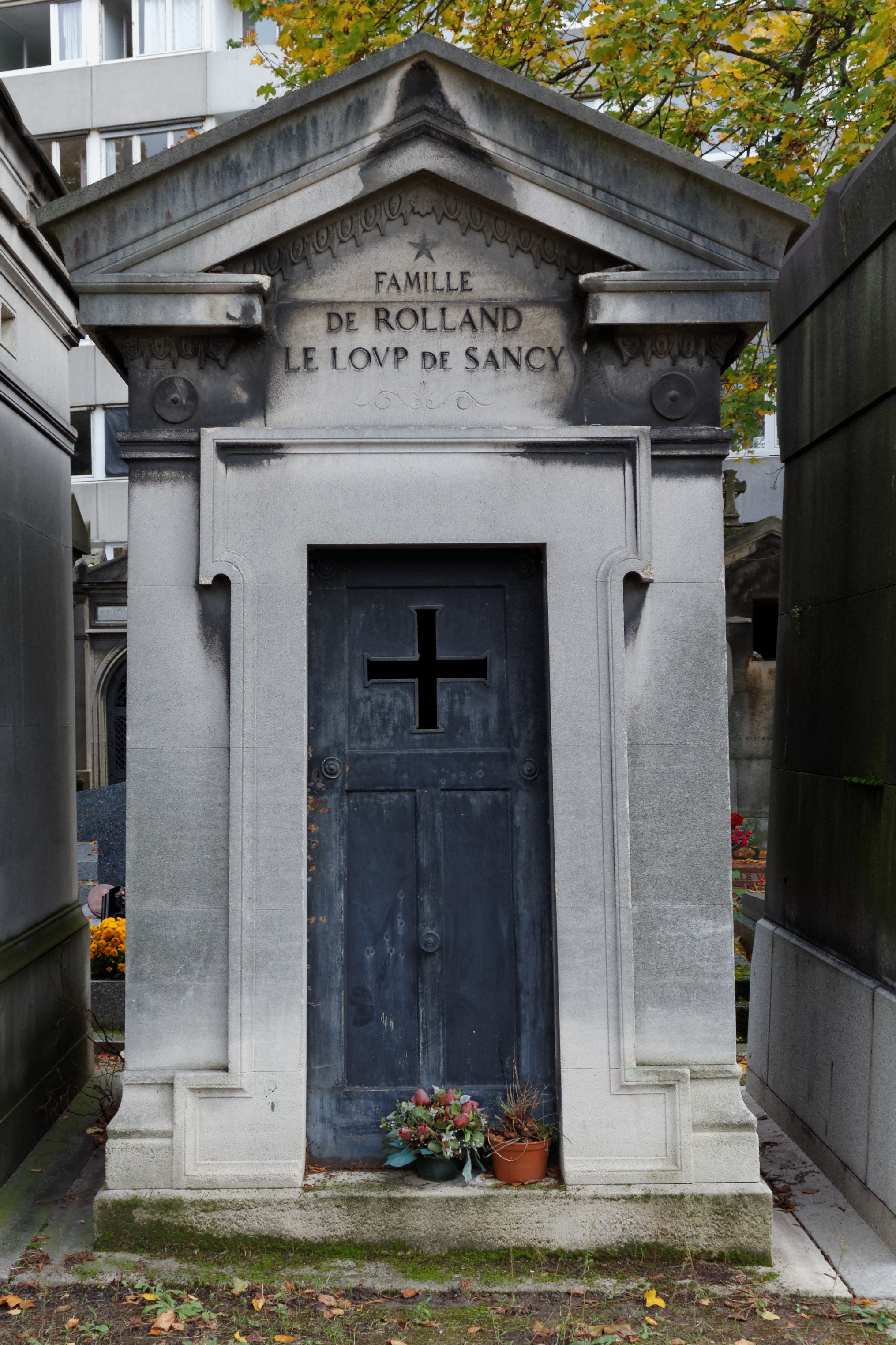 Chapelle comprenant notamment Pierre Rolland (1772-1848), Louis-Félix-Joseph Le Loup de Sancy (1796-1867), Pierre-Lucien Le Loup de Sancy (1840-1924).